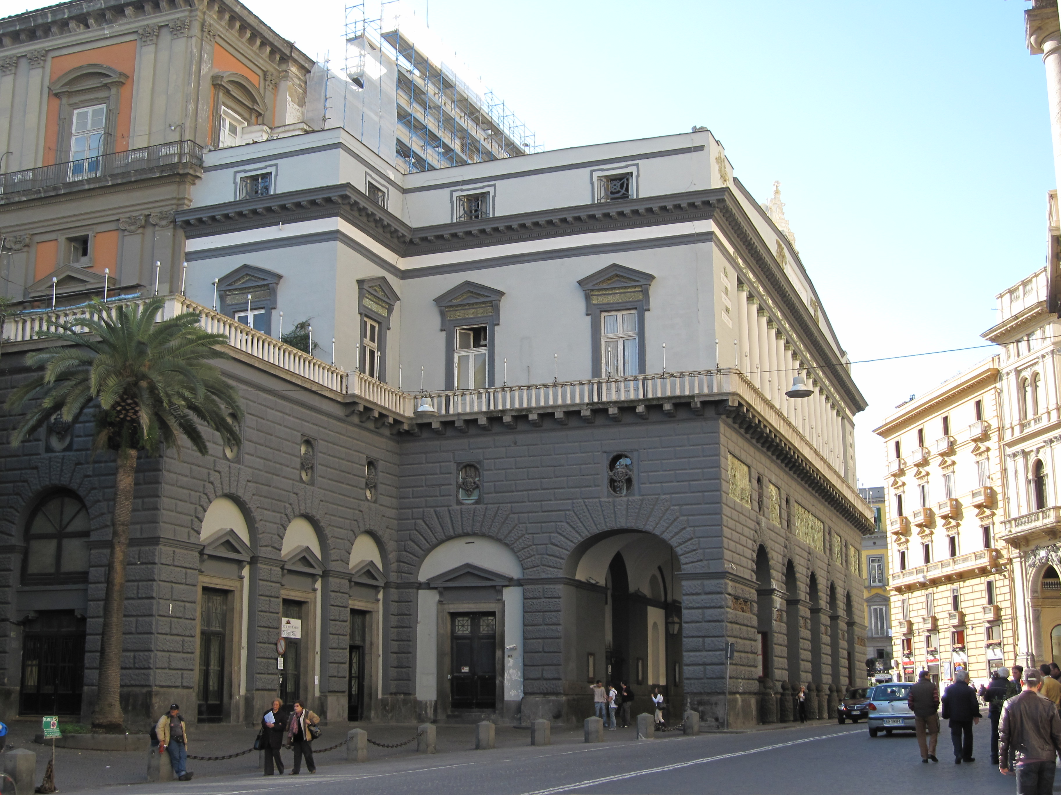 Real Teatro San Carlo di Napoli. Vista laterale da Via San Carlo.